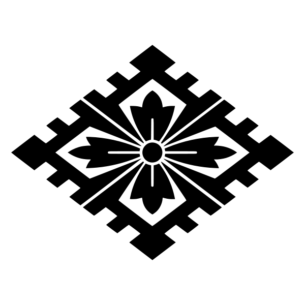 家紋：大内菱